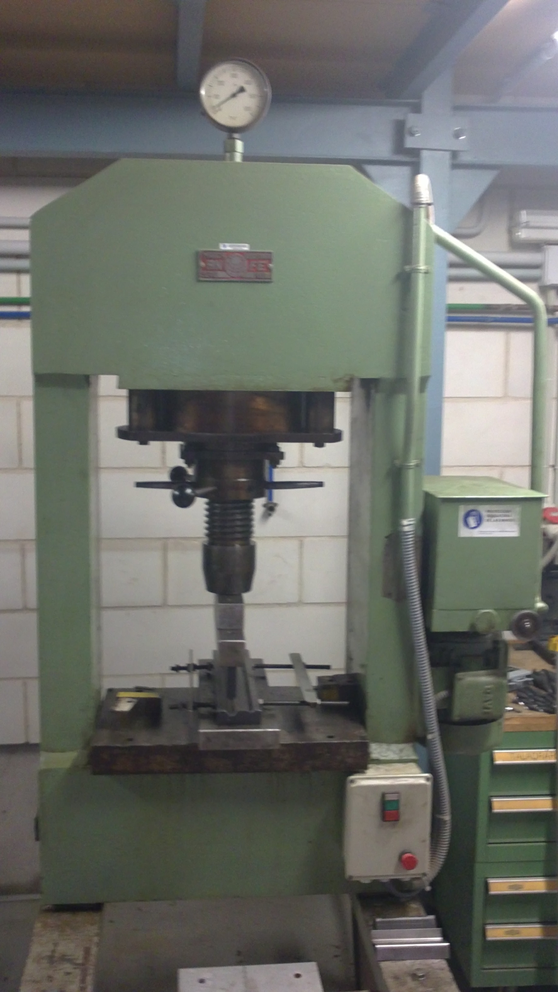 Prensa doblat chapa